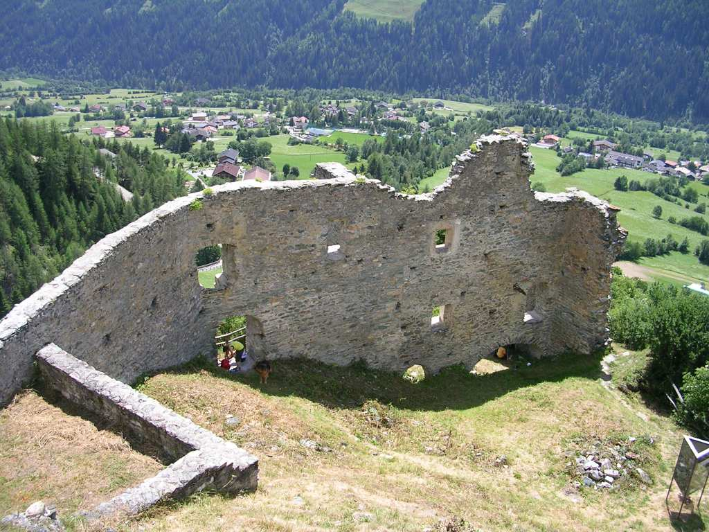 Burgruine Rabenstein